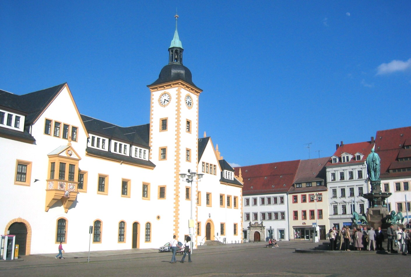 Freiberg, Sachsen, Germany: Town Hall, Obermarkt square